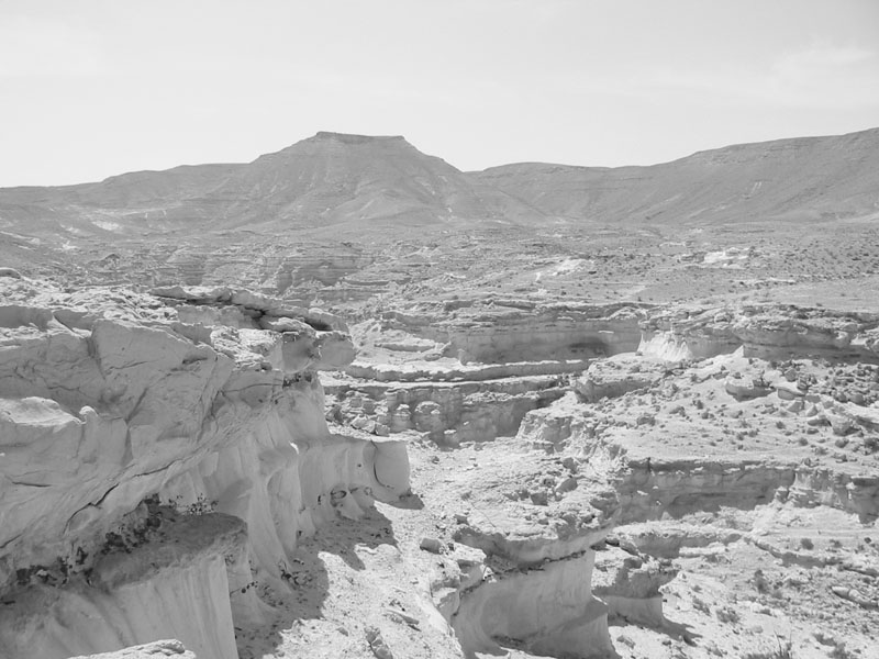 Negev bei Stey Boker, Israel